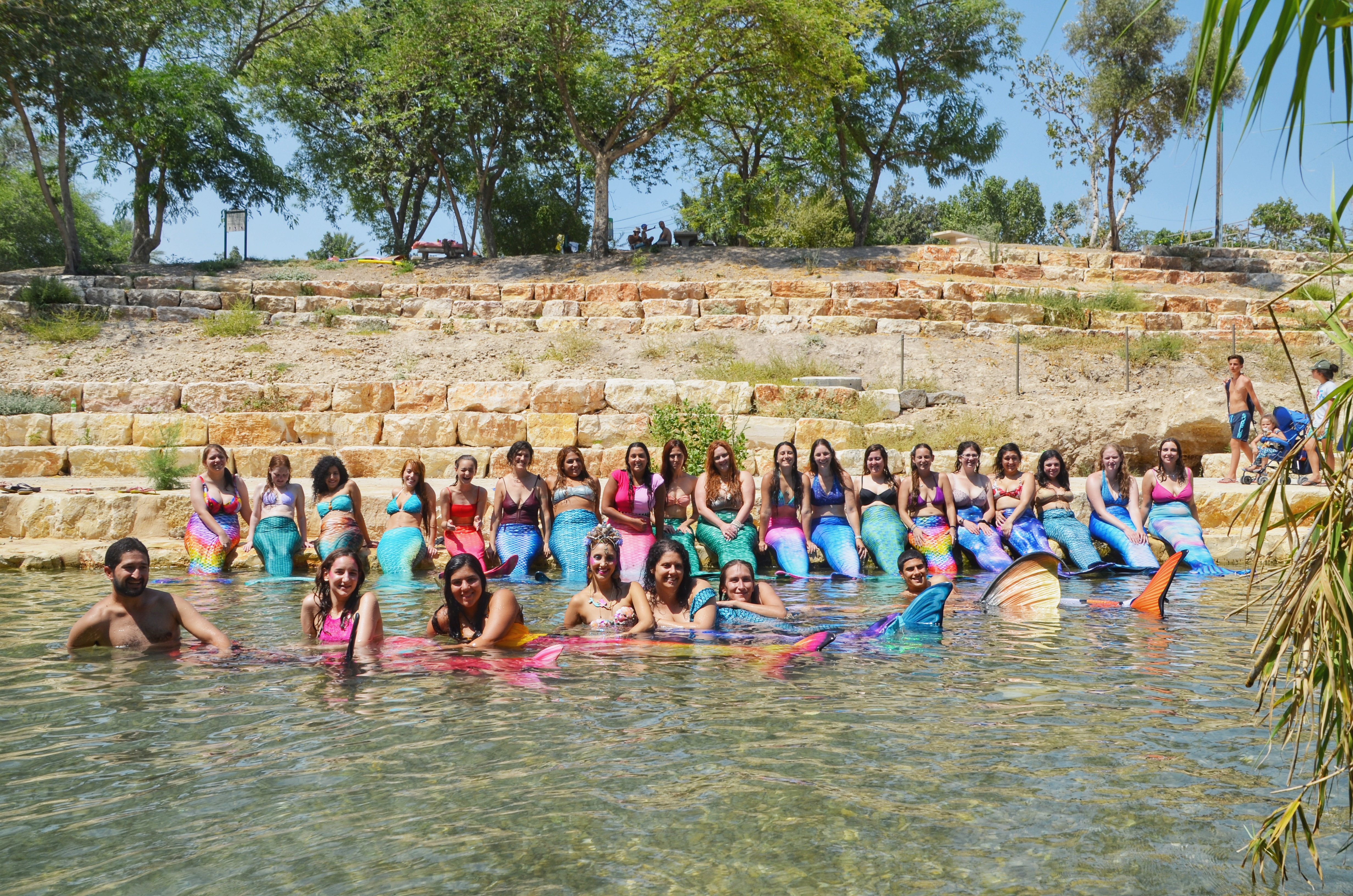 מפגש קהילת בני ובנות הים בקיץ 2019 בגן השלושה. צילום